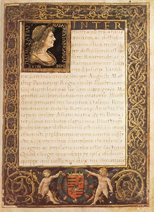 Kódexoldal Hunyadi Mátyás mellképével és címerével. Giovanni Francesco Marliano: Epitalamium in nuptiis Blancae Mariae Sfortiae et Johannis Corvini című múve A kódex Marlianus milánói szenátor Corvin János és Maria Bianca Sforza eljegyzése alkalmából elmondott üdvözlő beszédét tartalmazza. Az egykor a Corvina Könyvtárhoz tartozó könyv díszítését Ambrogio de Predis lombard miniátor készítette 1488 körül. Pergamen, tempera és arany; a lap mérete 21x15 cm Volterra, Biblioteca Guarnacci, Cod. Lat. 5518. IV. 49. 3. 7, fol. 5r Marlianus Mediolanensis, Ioannes Franciscus: Epithalamium in nuptiis Blancae Mariae Sfortiae et Iohannis Corvini